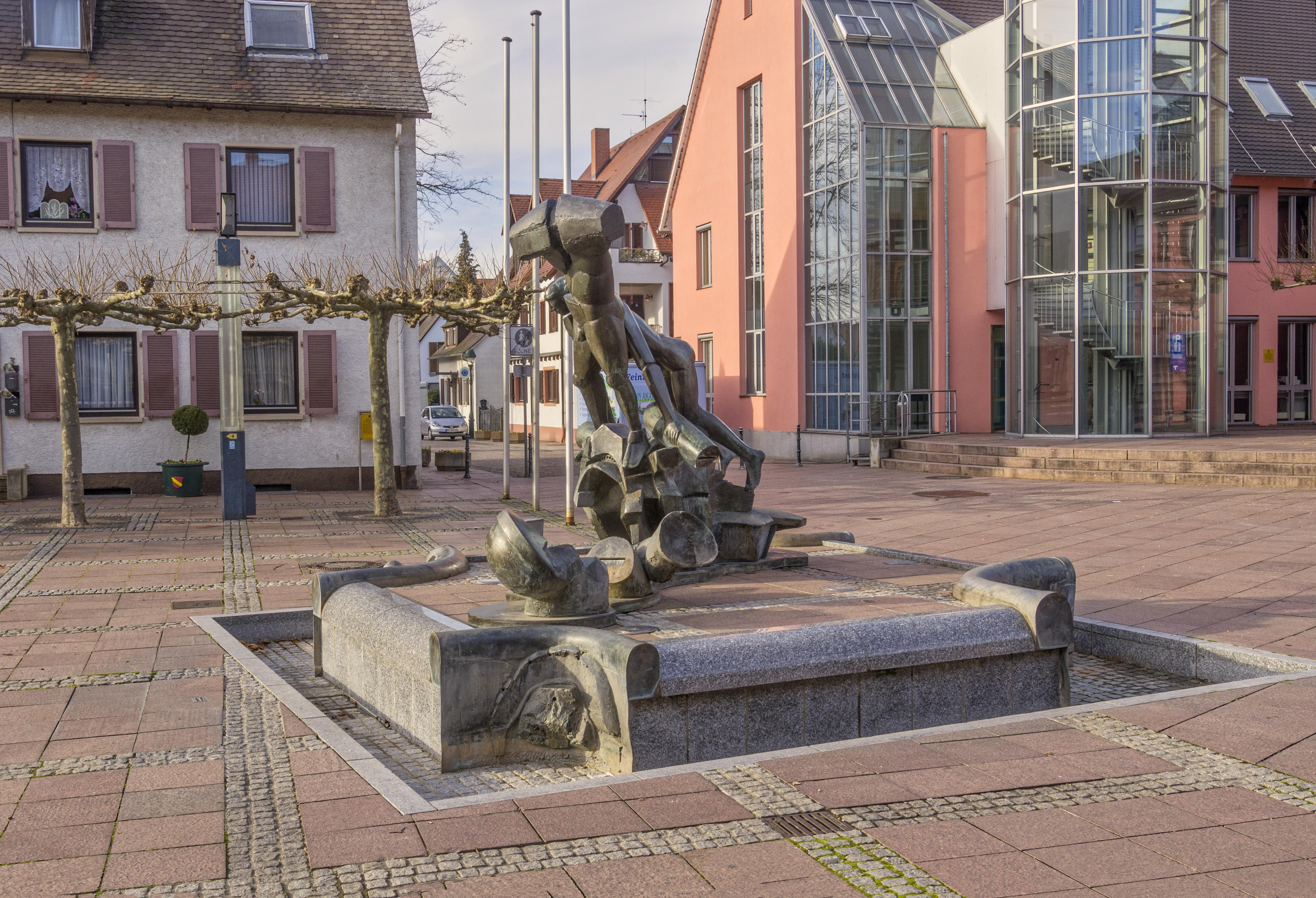 Bilder aus Neuenburg am Rhein Bilder der aus Bronze gegossenen Brunnenanlage "Monument" aus dem Jahre 1990 auf dem Rathausplatz ist von Professor Lutz Brockhaus und stellt eine Chronik des Überlebenswillens der Stadt Neuenburg dar